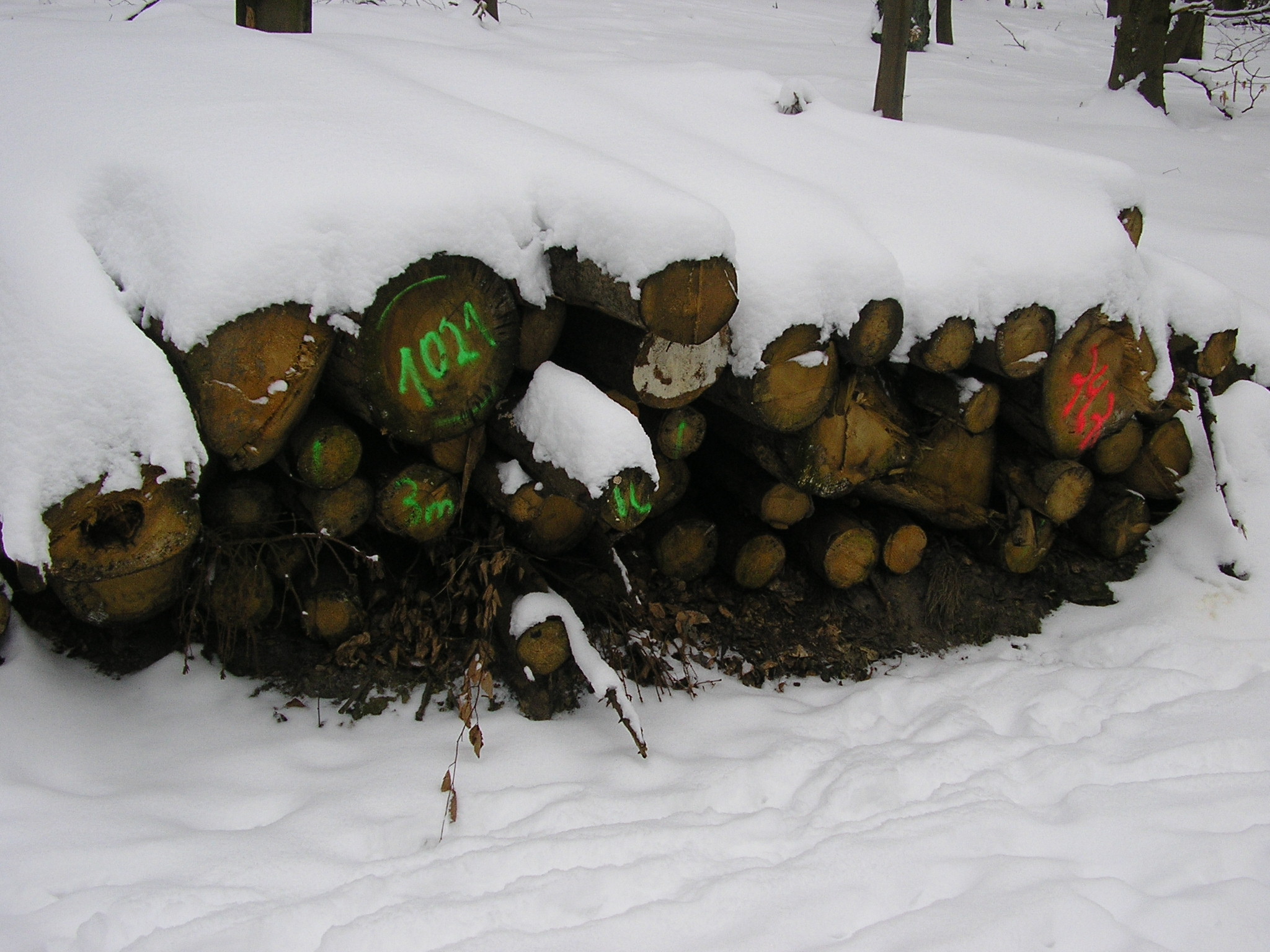 Holzstoß im Wiehengebirge, nahe Reineberg